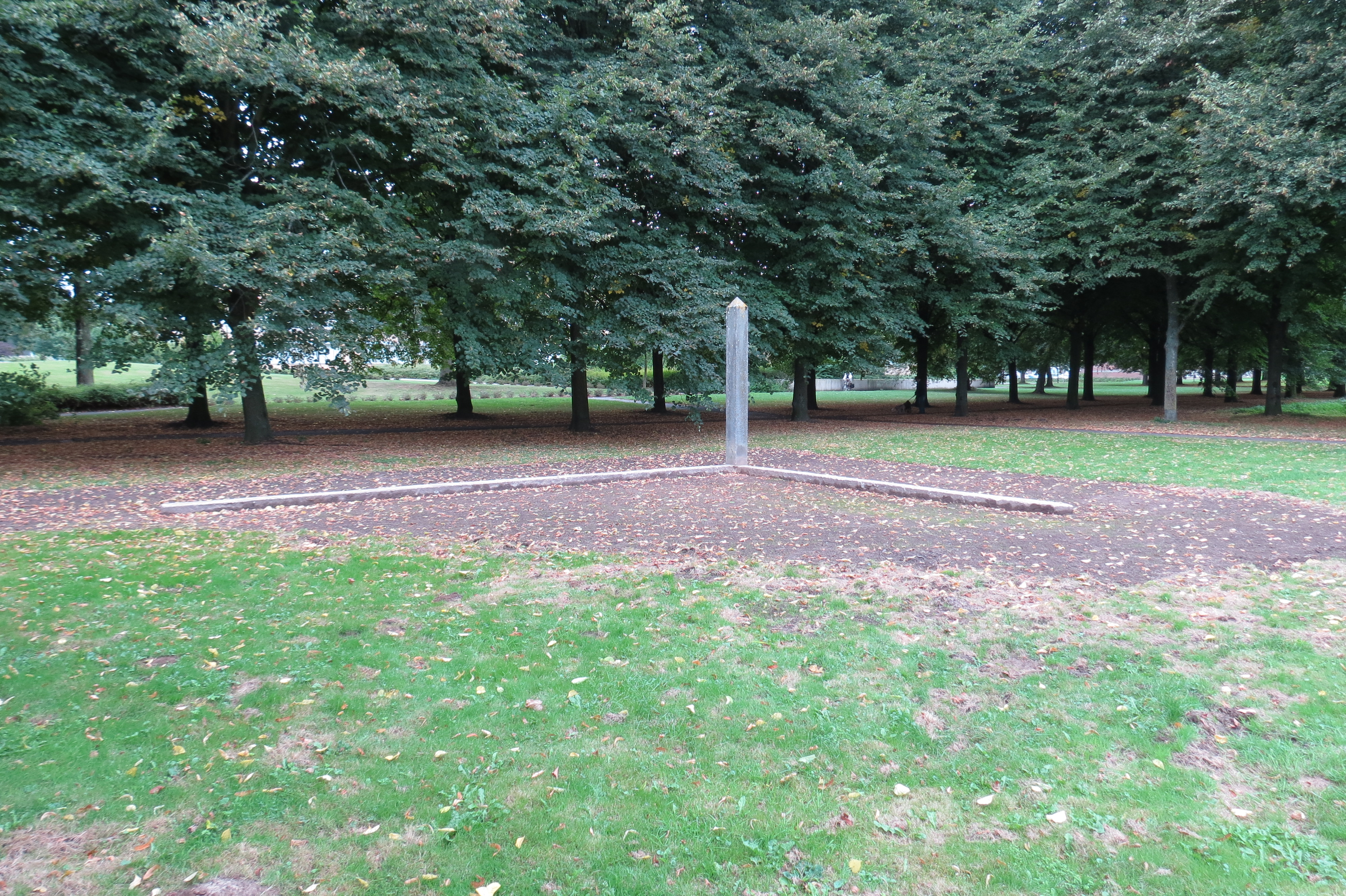 Zicht vanuit het zuiden op het Van de Vennepark-Zuid en het beeld de obelisk vóór het belastinkantoor aan de Via Regia in de Maastrichtse wijk Pottenberg.